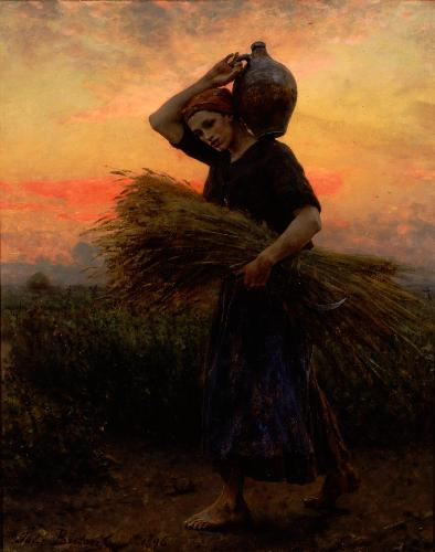 Dawn